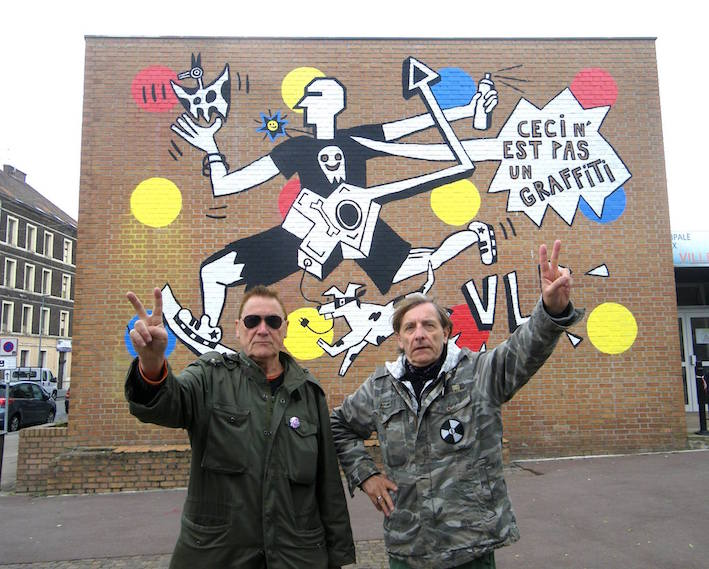 Biennale de Denain, 2015